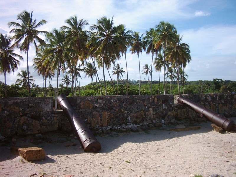 Forte de Orange, ilha de Itamaracá, estado de Pernambuco, Brasil.